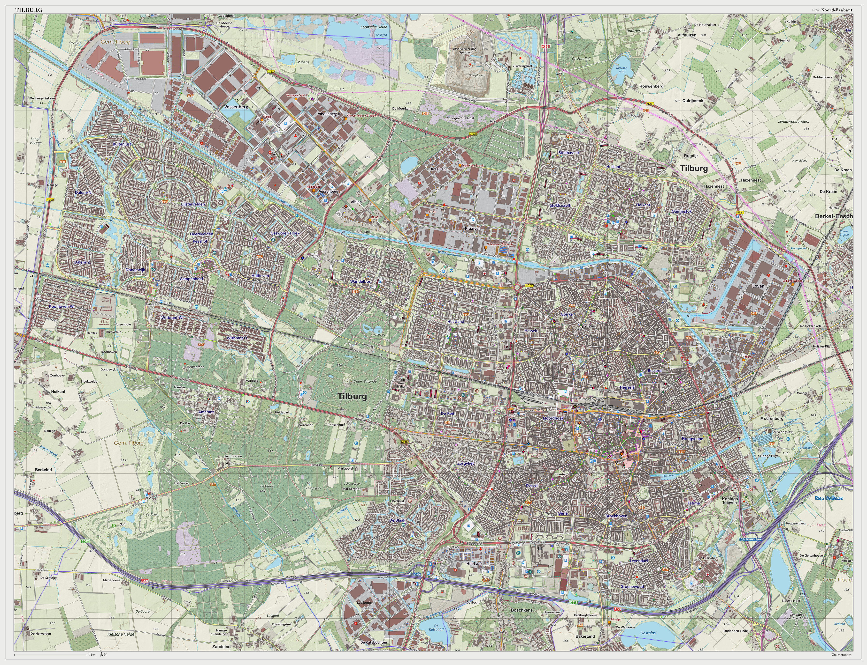 Topografische kaart van Tilburg (woonplaats). Resolutie: 300 pixels/km. Kaartbeeld samengesteld uit de open geodata van de Top10NL en Top25namen (Basisregistratie Topografie, Kadaster), Creative Commons BY licentie. Gebouwvlakken uit open geodata BAG extract. Wegen uit de OpenStreetMap. Reliëfschaduw uit de Actuele Hoogtekaart AHN2. Samenstelling en kleurenschema: Jan-Willem van Aalst, met QGIS2. Zie ook de Legenda.